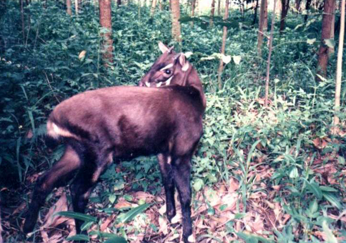 Saola Pseudoryx nghetinhensis Thể loại:Sách đỏ Việt Nam